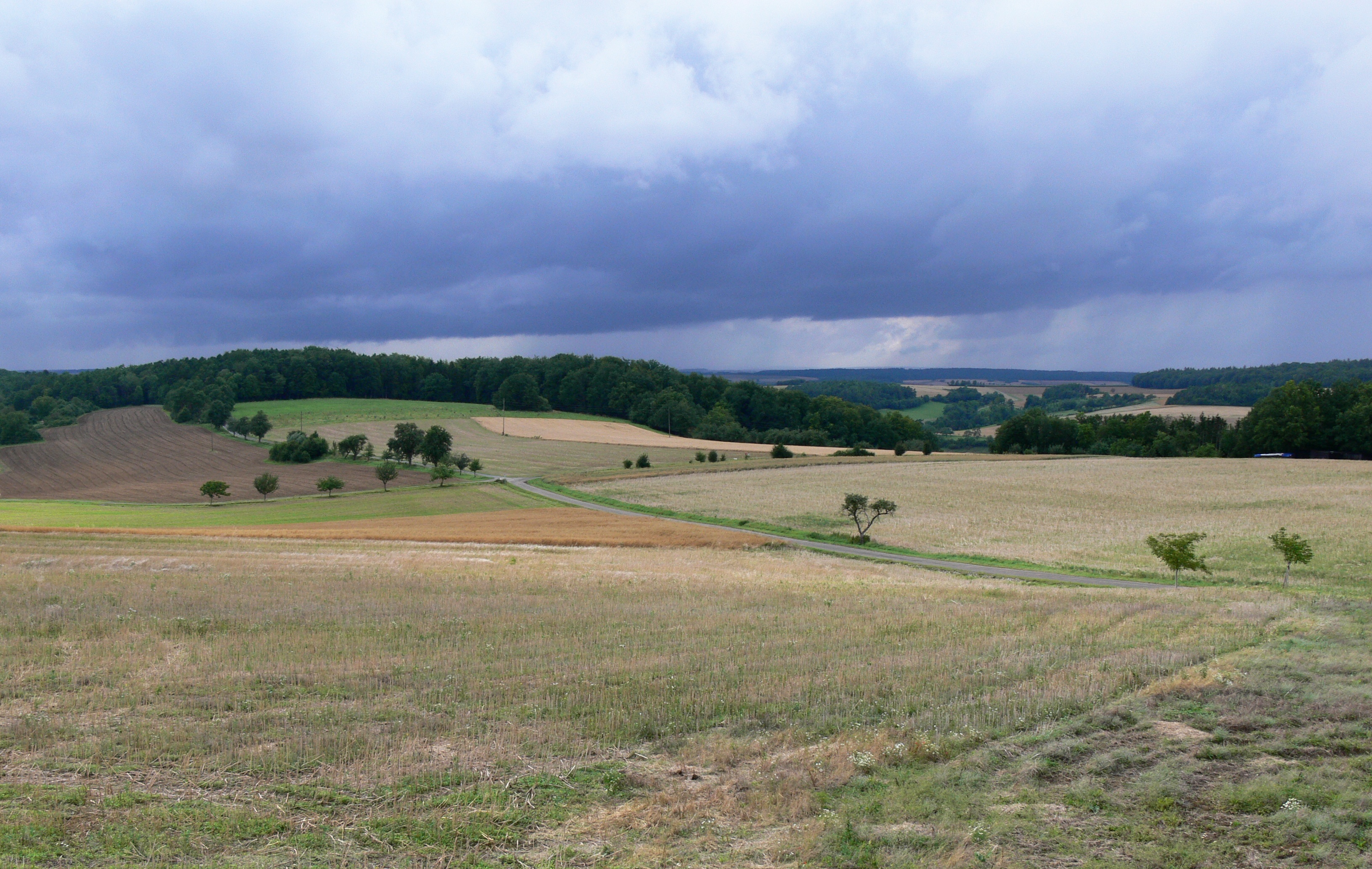 Die ehemalige Hohe Straße zwischen Kocher und Jagst bei Diebach in Baden-Württemberg. Sie war im Mittelalter Teil der Fernverbindung von Speyer nach Nürnberg, über Wimpfen und Rothenburg ob der Tauber.